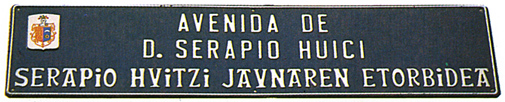 Avenida en nombre del Hijo Predilecto de Navarra Serapio Huici en Villaba, Navarra